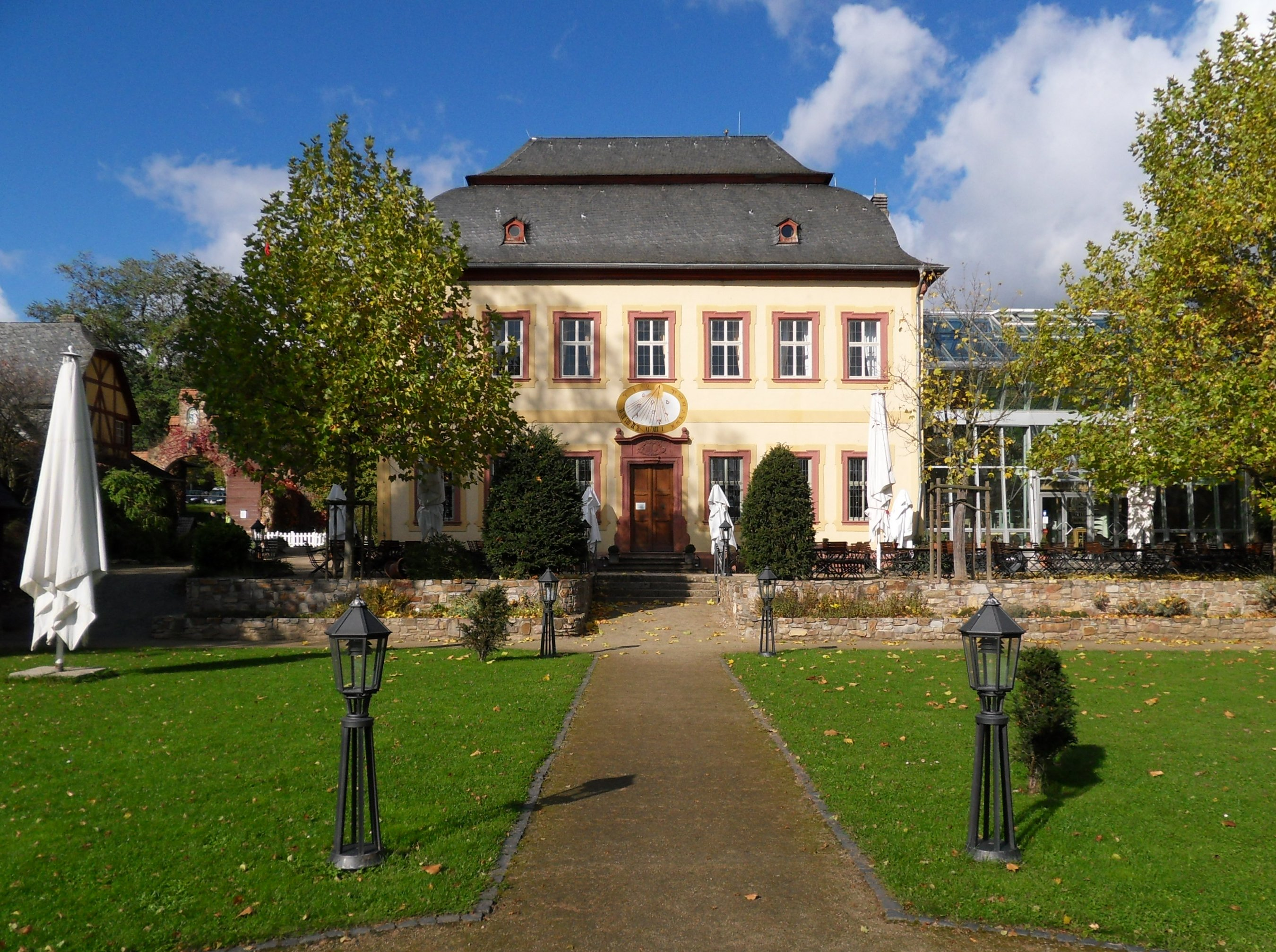 Orangerie im Schloss Vollrads bei Winkel im Rheingau, Südseite